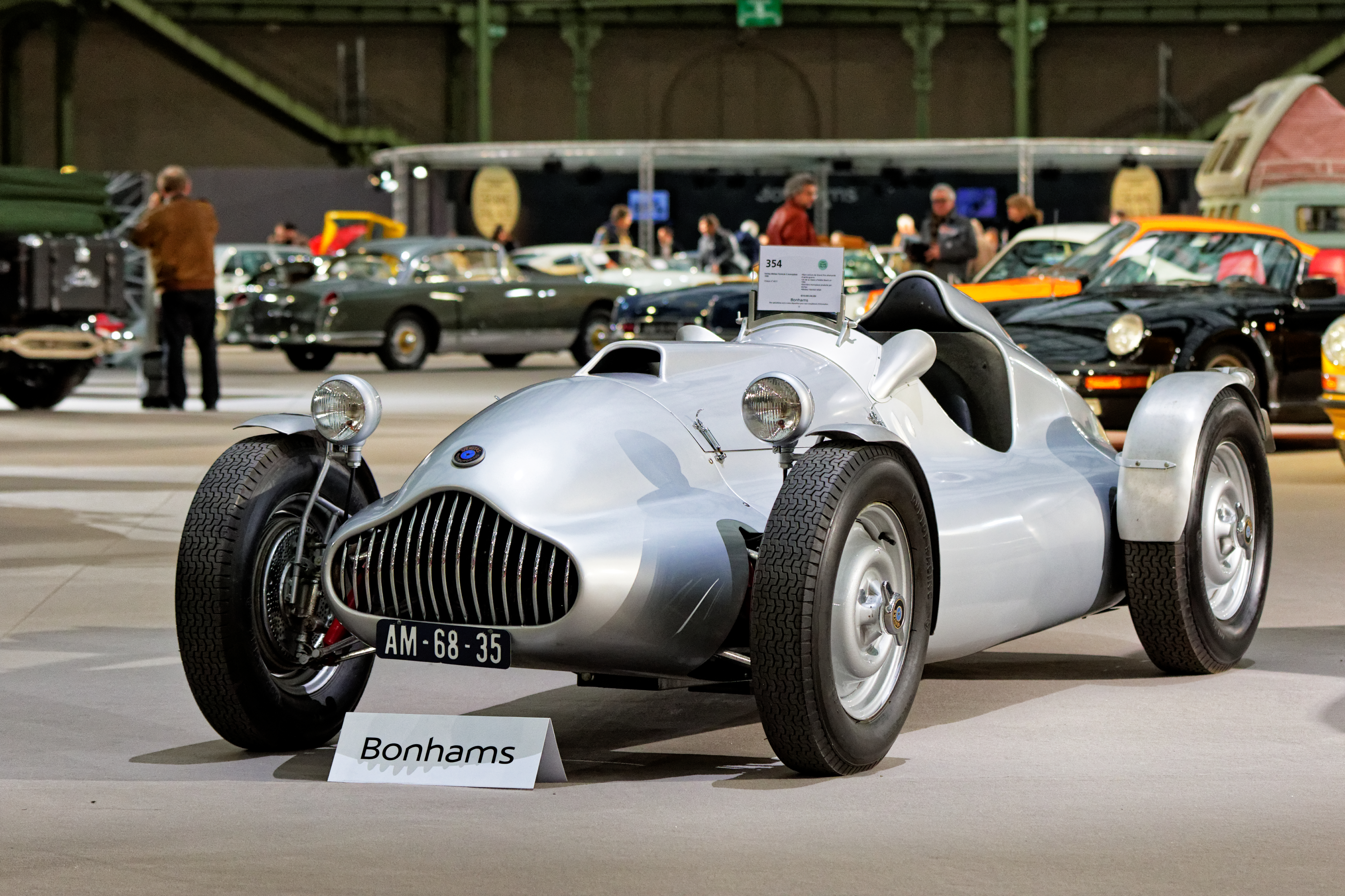 Un des véhicules présenté lors de la vente aux enchères Bonhams 2016 au Grand Palais de Paris.